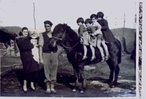 Pottoka bat joan den mendearen hasieran Zestoako Iraeta auzoan.